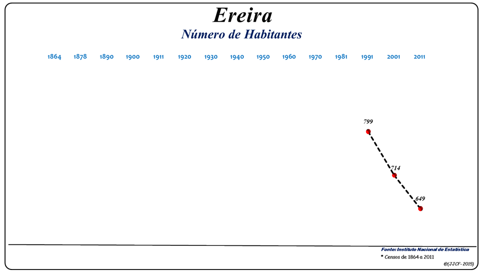 População